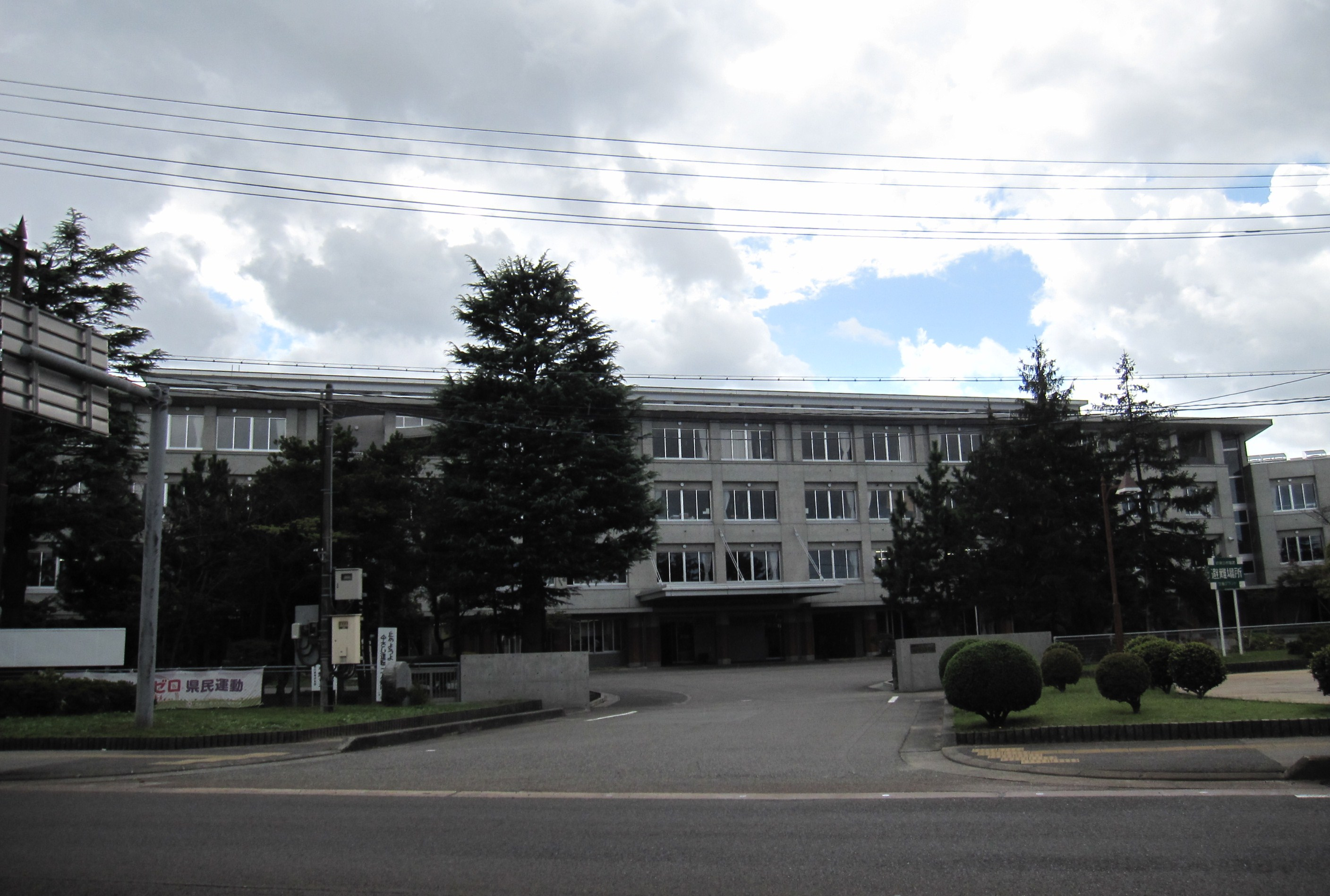 新潟県立新発田高等学校